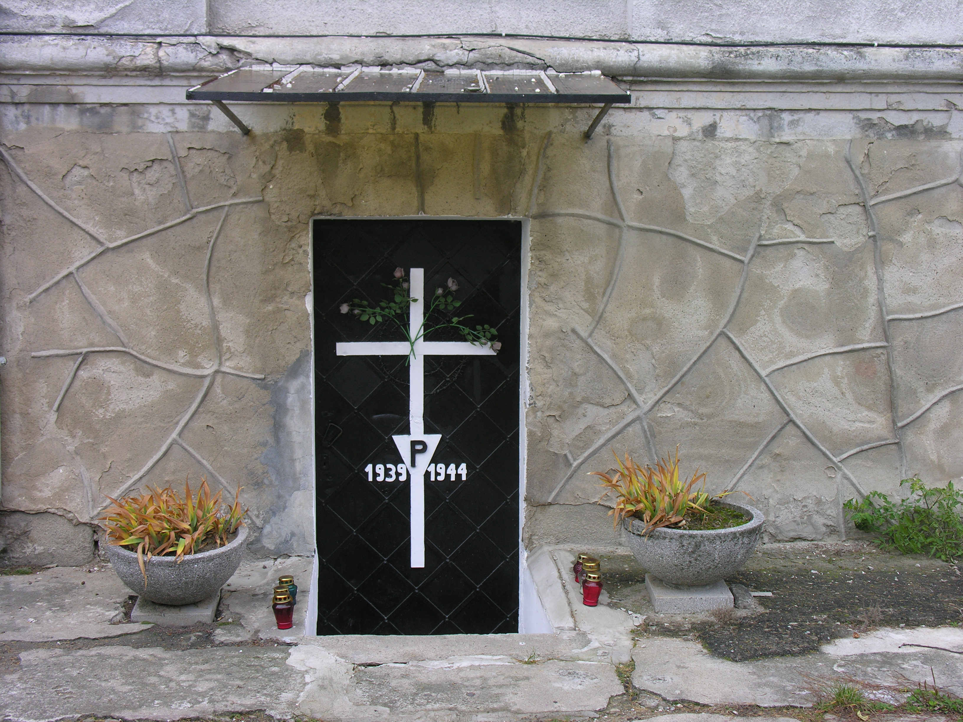 Wejście do katowni gestapo w Jaśle (obecnie szpital), ul. Za Bursą 1